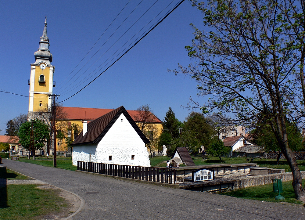 Pásztó, Plébániatemplom és az Oskolamester háza This is a photo of a monument in Hungary, Identifier: 6769